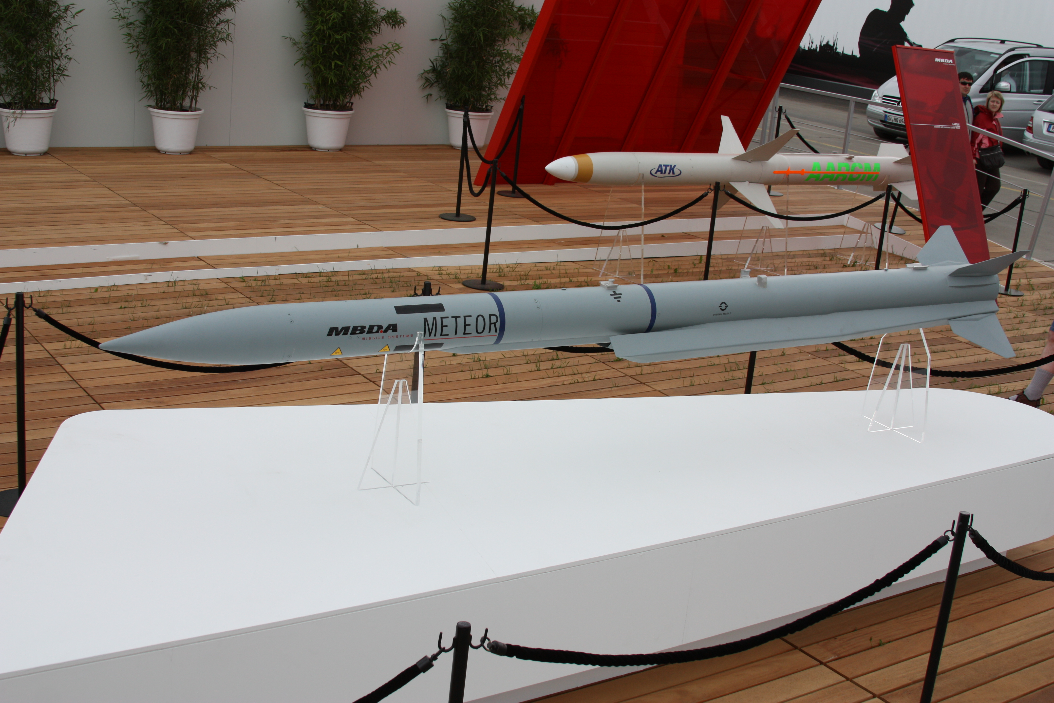 ILA 2010, am Samstag aufgenommen, meist erhöht von einer Leiter fotografiert